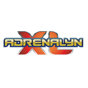 Logo des Sammelkartenherstellers Adrenalyn XL